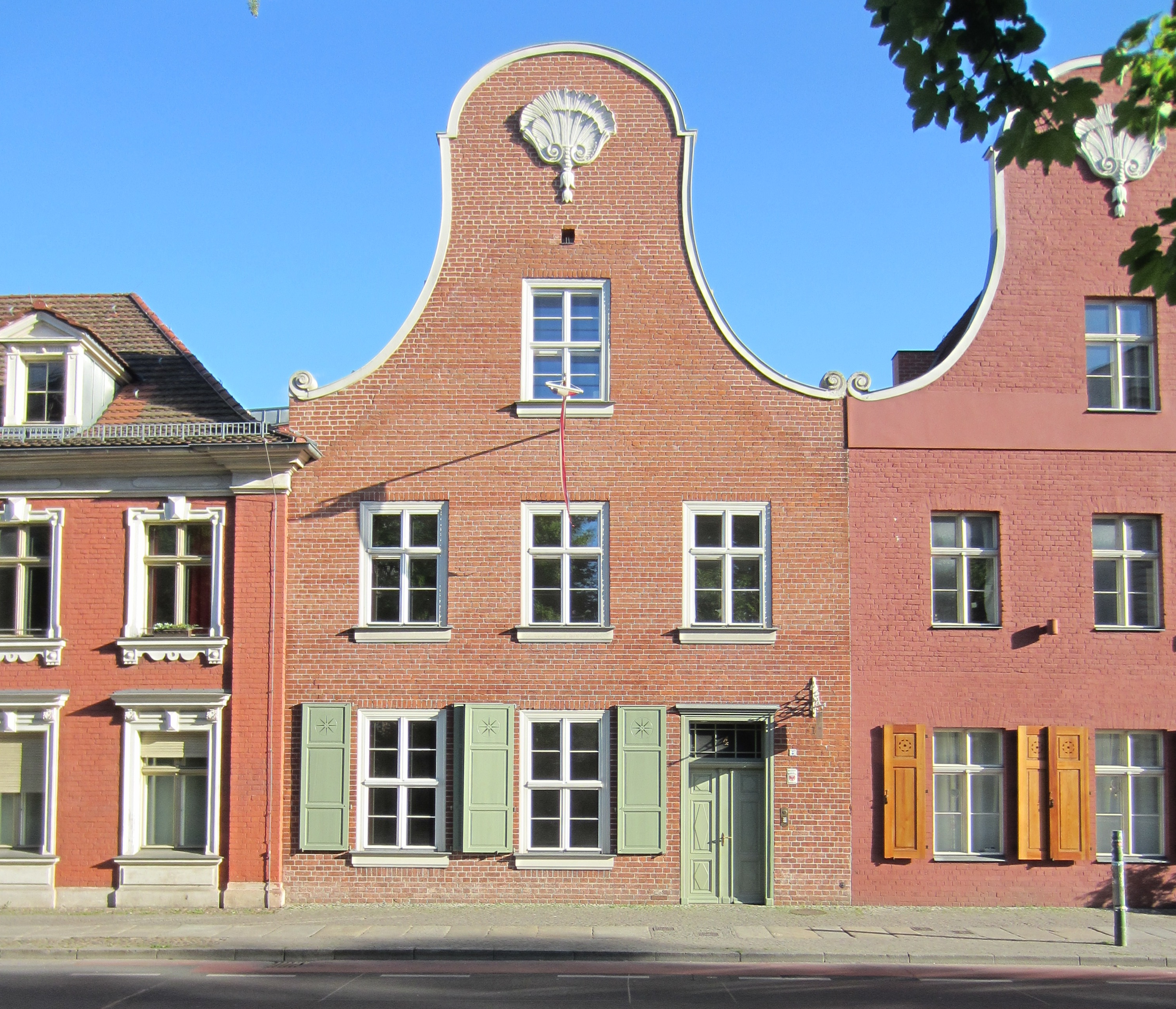 Denkmalgeschütztes Bürgerhaus des Holländischen Viertels, Kurfürstenstraße 4 in Potsdam